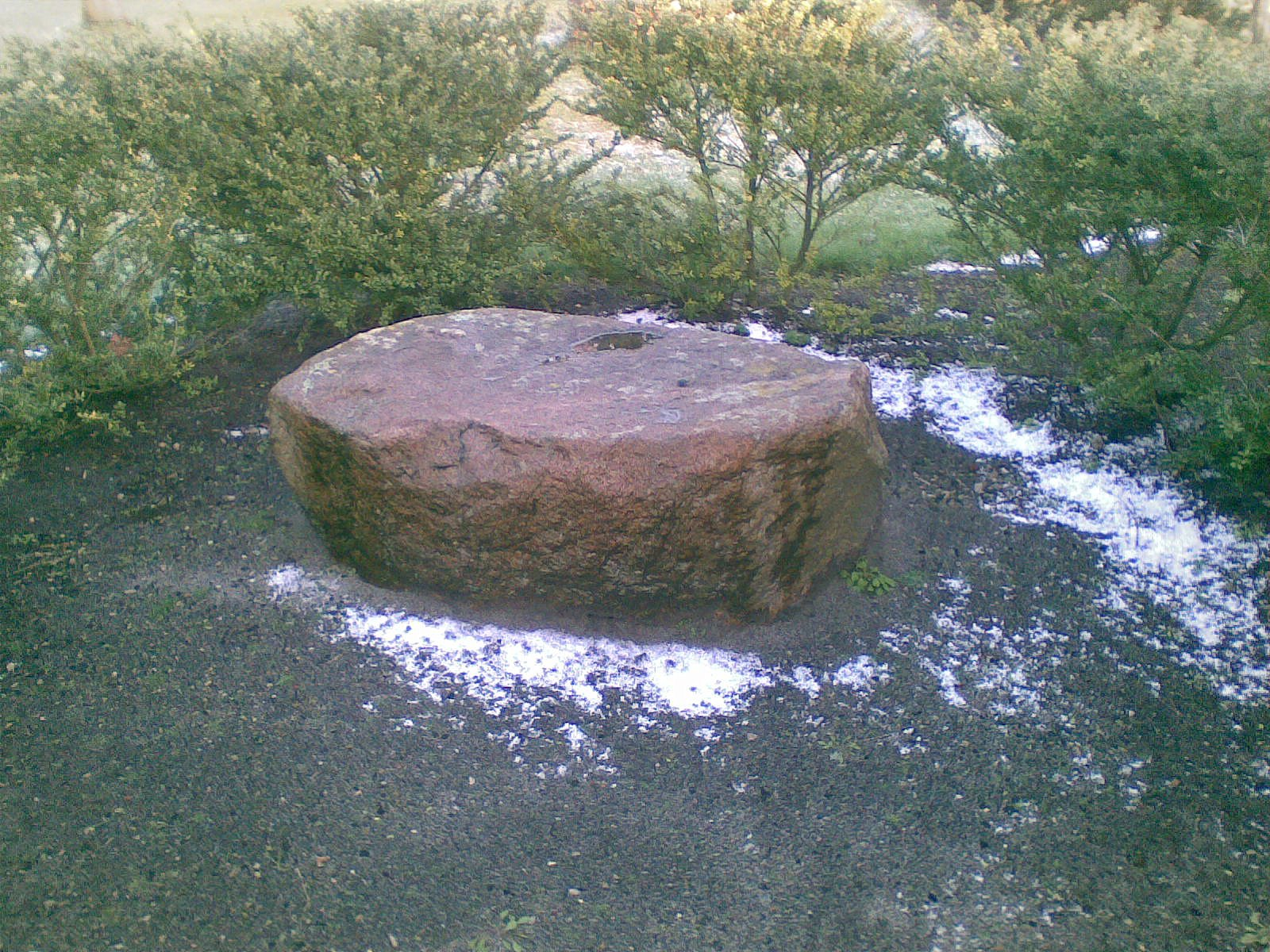 Der Hilgensteen 2008